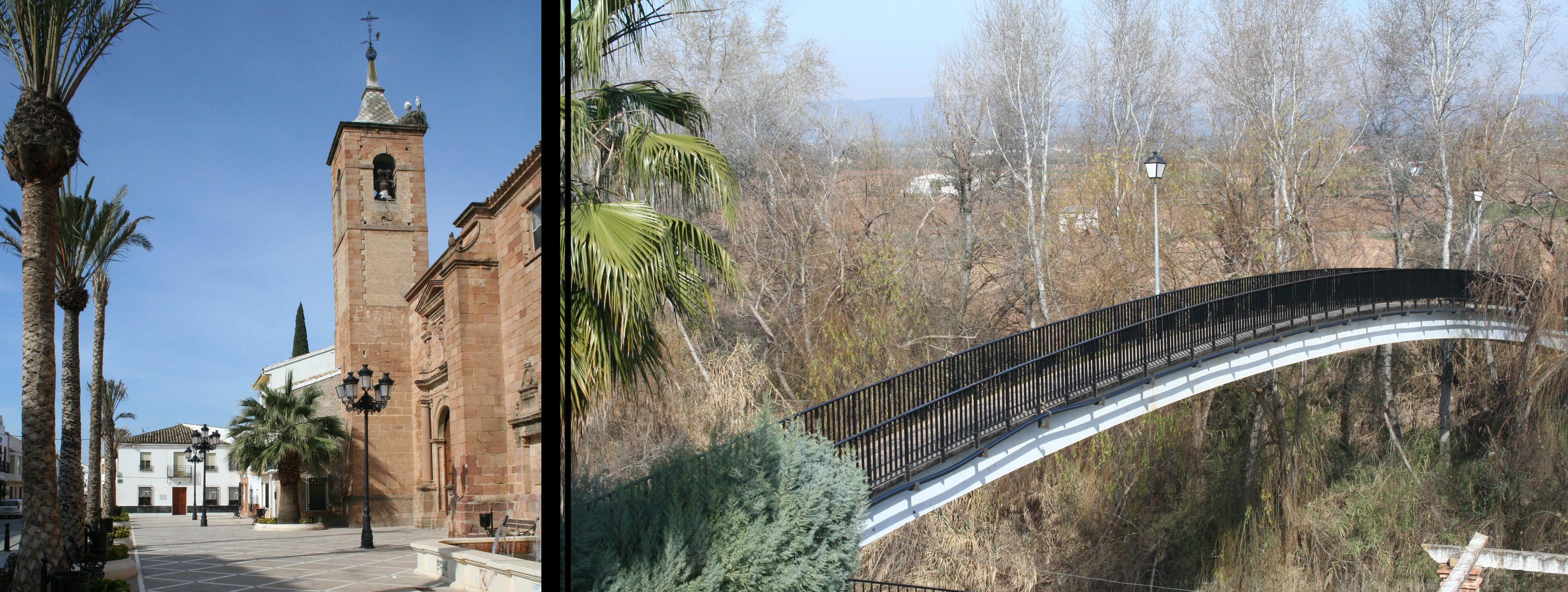 Iglesia y Pasarela sobre el Guadalquivir en Villanueva de la Reina